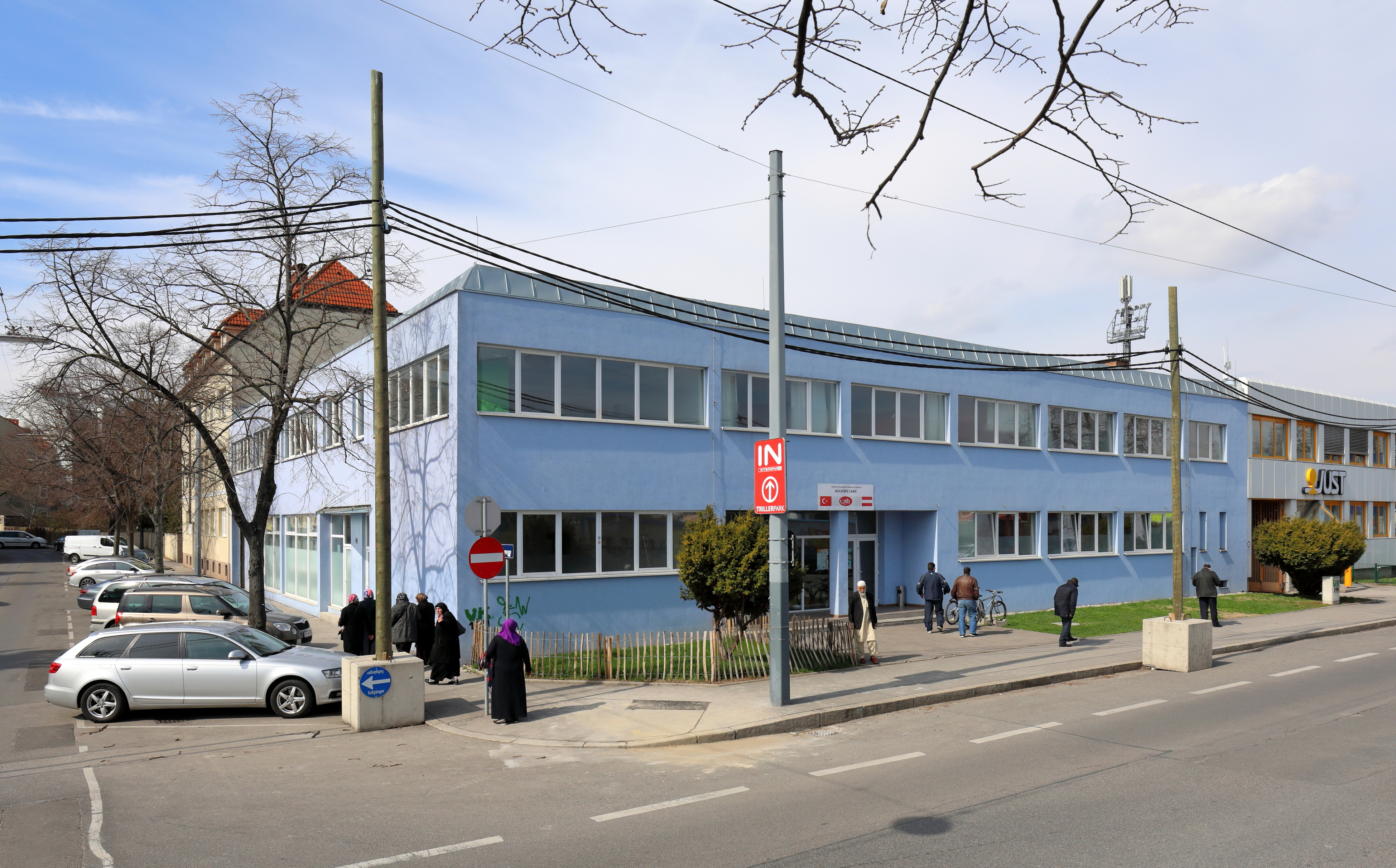 Kulturzentrum des türkisch-islamischen Kulturvereins ATIB Union in der Rappgasse im 21. Wiener Bezirk Floridsdorf.Um 2010 wurde das ehemalige zweigeschossige Firmengebäude angekauft und anschließend darin ein Kulturzentrum mit Moschee, Koranschule und Kindergarten eingerichtet.